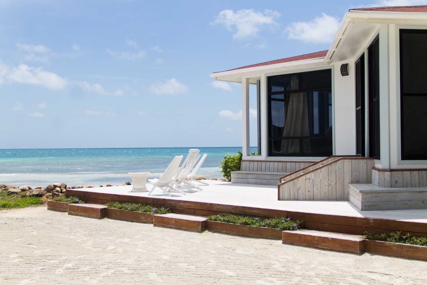 Royal Belize Beach Resort